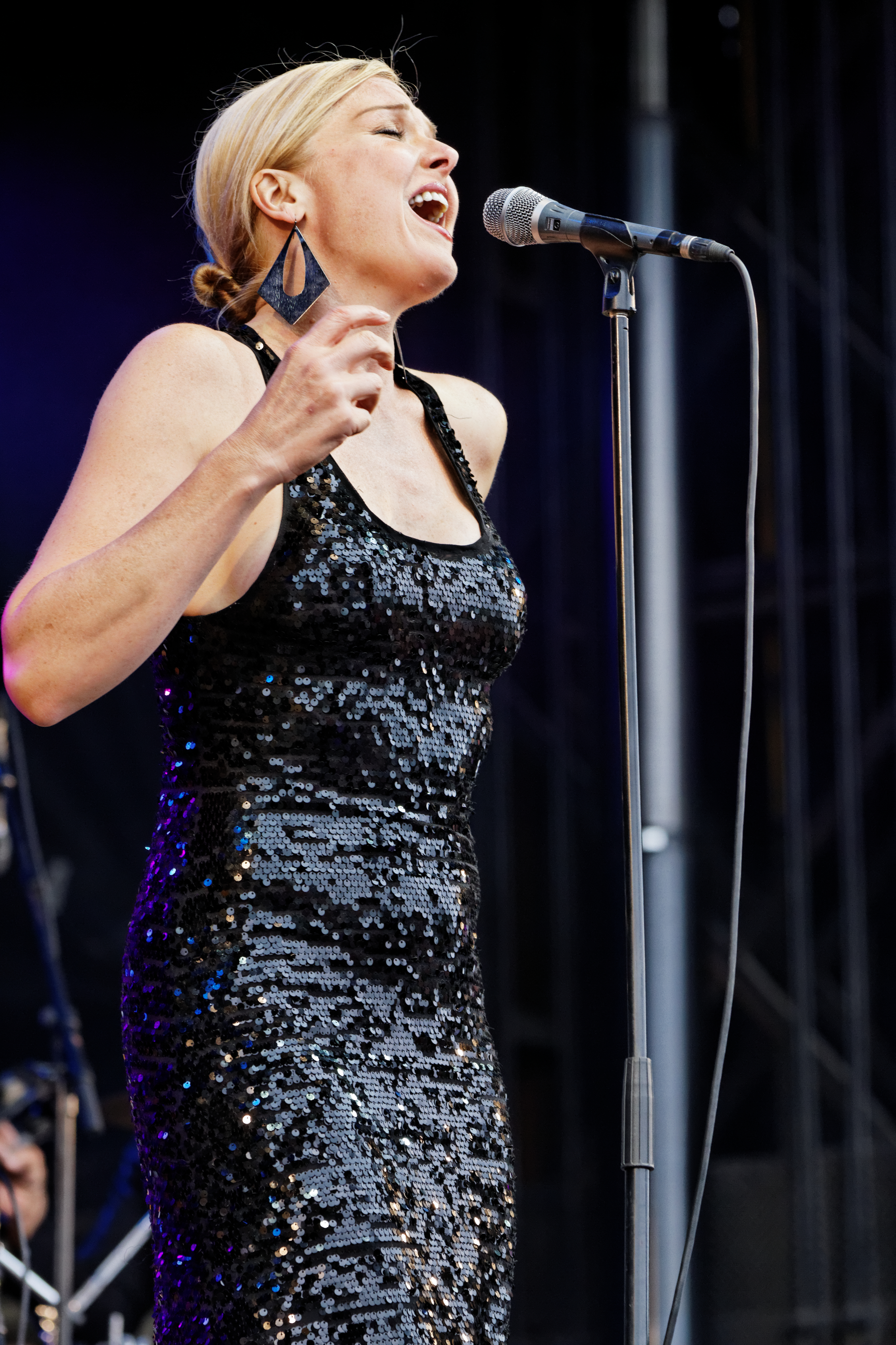 Pink Martini en concert sur la scène Landaoudec lors du festival du bout du Monde à Crozon dans le Finistère (France).